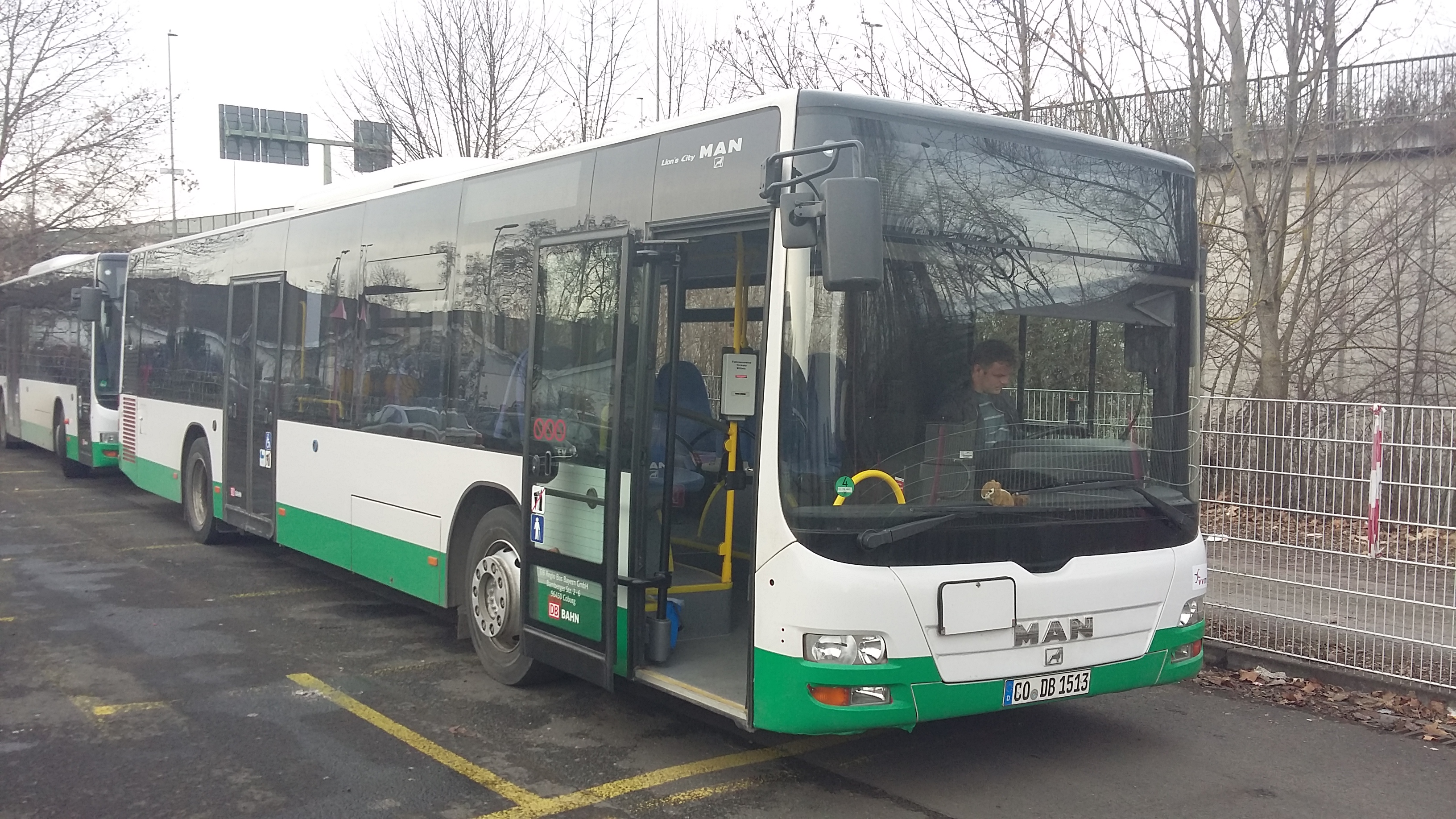 DRB-Bus im vvm Würzburg